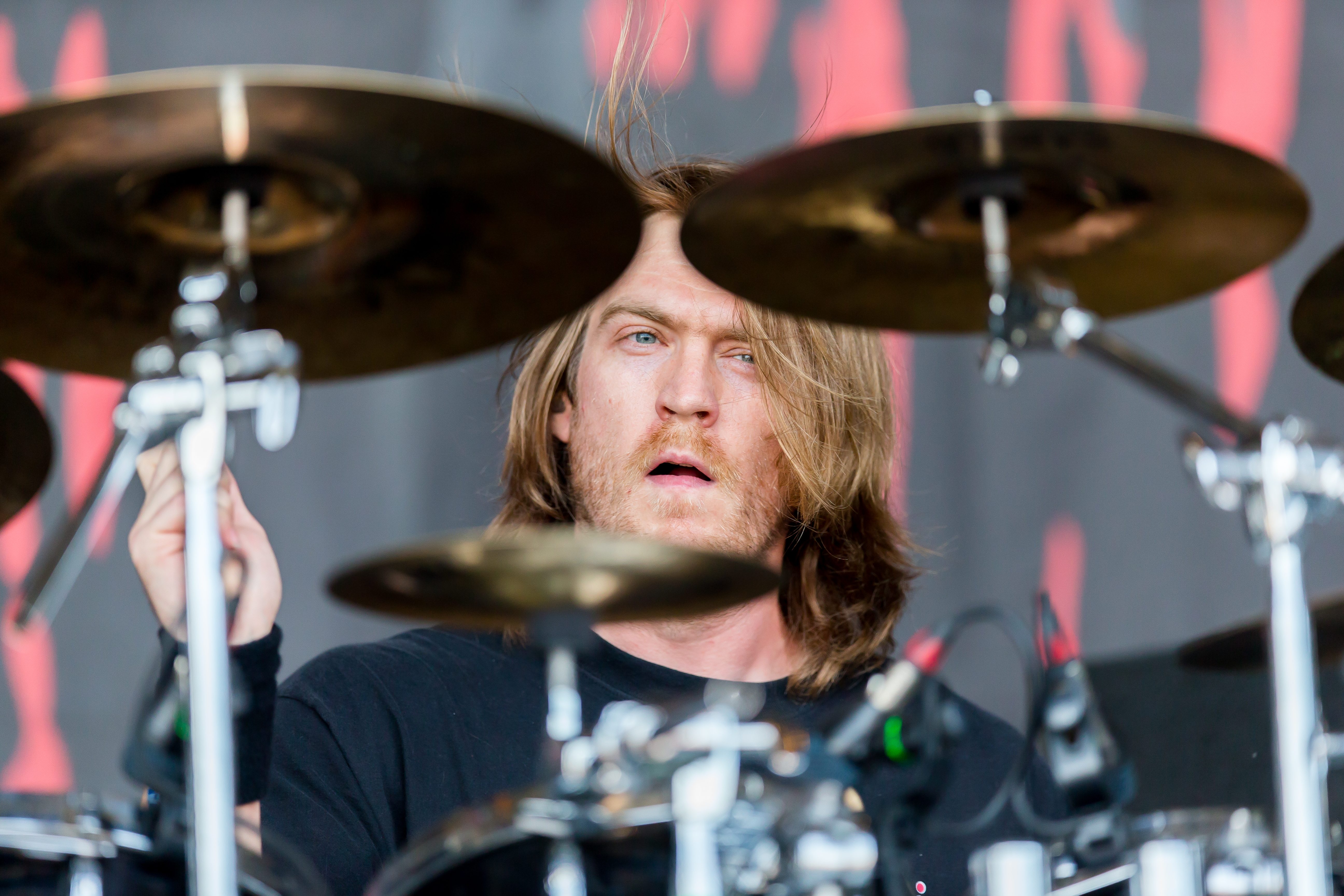 Dying Fetus during Summer Breeze 2016 at , Dinkelsbühl, Bayern, Germany on 2016-08-19, Photo: Sven Mandel